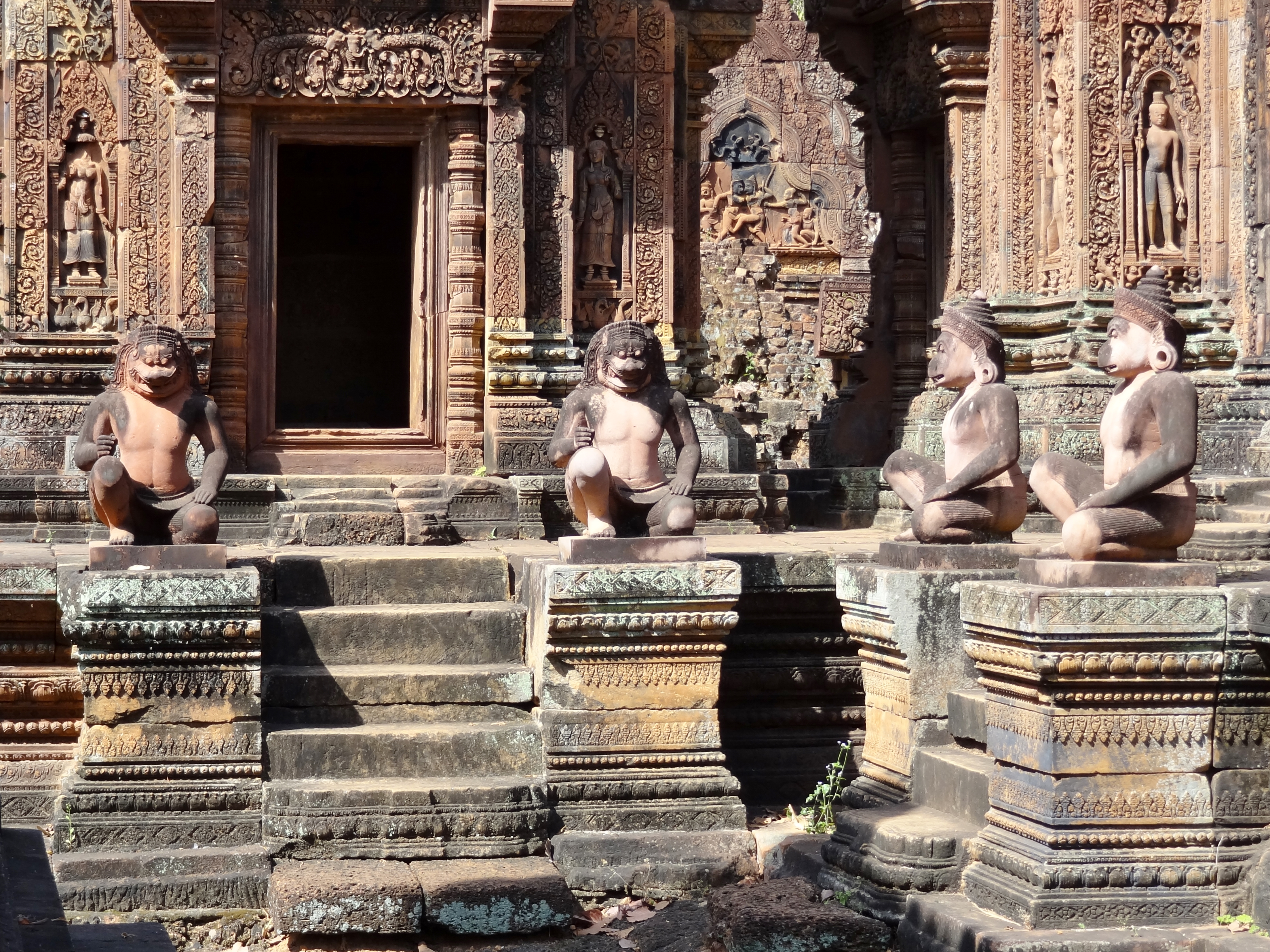 Wächterskulpturen vor dem südlichen Prasat und der Mandapa des zentralen Prasat der Banteay Srei (ប្រាសាទបន្ទាយស្រី ‚Zitadelle der Frauen‘), ursprünglich Tribhuvanamahesvara (‚Großer Gott der dreifaltigen Welt‘), Provinz Siem Reap, Kambodscha